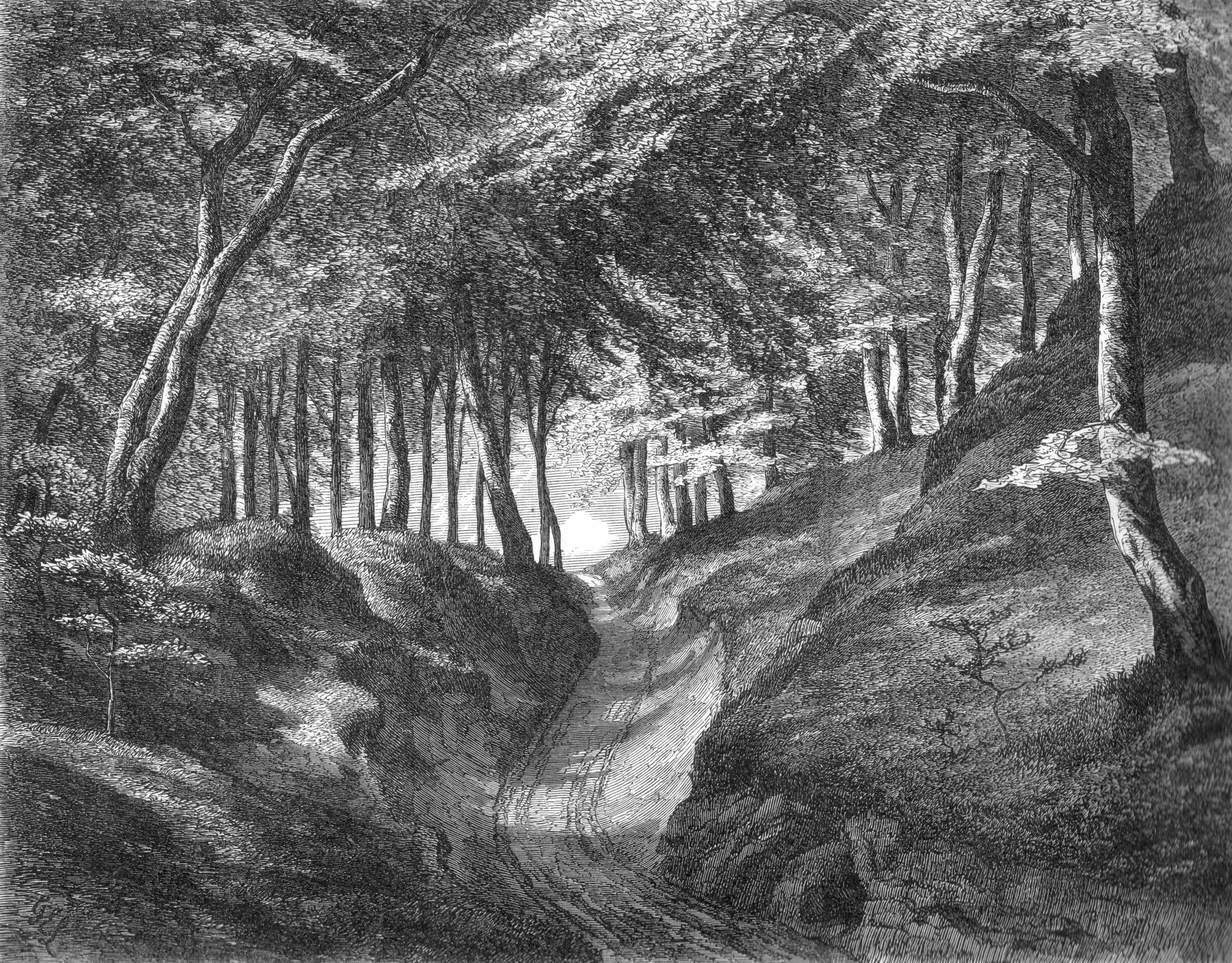 Hulvejen ved Ørholm Papirfabrik.